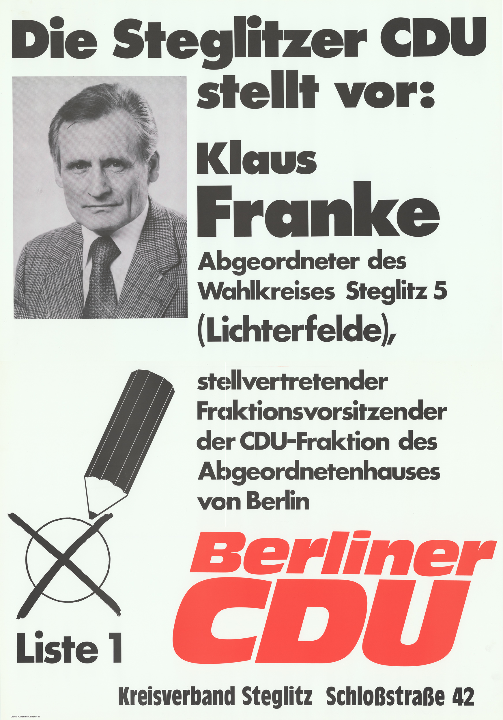 Die Steglitzer CDU stellt vor: Klaus Franke ... stellvertretender Fraktionsvorsitzender der CDU-Fraktion des Abgeordnetenhauses von Berlin Liste 1 Berliner CDU Kreisverband Steglitz ... Abbildung: Porträtfoto - Bleistift mit Stimmkreuz Kommentar: Zweiteiliges Plakat Plakatart: Kandidaten-/Personenplakat mit Porträt Auftraggeber: KV Steglitz Drucker_Druckart_Druckort: A. Hentrich, Berlin-Steglitz Objekt-Signatur: 10-004 : 537 Bestand: Plakate zu Abgeordnetenhauswahlen Berlin (10-004) GliederungBestand10-18: Plakate zu Abgeordnetenhauswahlen Berlin (10-004) » CDU Lizenz: KAS/ACDP 10-004 : 537 CC-BY-SA 3.0 DE